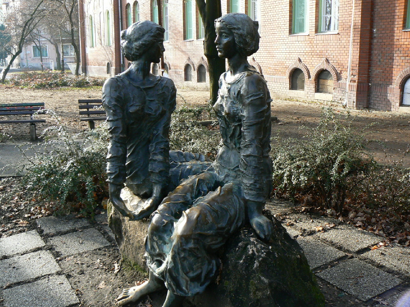 Tóth Valéria - a szegedi Tisza parton felállított szobra-, a karcsú, kecses tartású lányalakokat érdekes, egymást kiegészítő pózban ábrázolta. A kompozició szimmetriáját nagymértékben oldja a figurák csavart testhelyzete, egyben ennek is tulajdonítható, hogy körben járva, minden oldalról mozgalmas látványt nyújtanak. A szoborcsoportban a főszerep a gazdagon fodrozott drapériaszerű ruházat. A Leányok című szobor a szegedi nyári tárlatok anyagából történt. 1984-ben állították jelenlegi helyére a Korányi fasor 2. sz. alá.